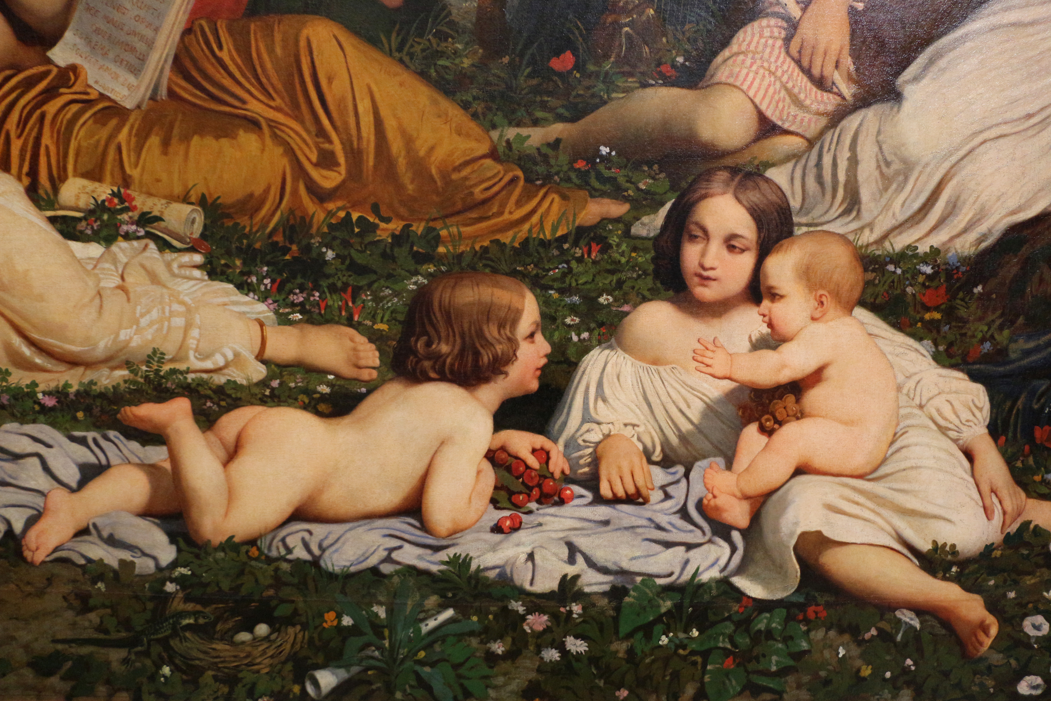 detail